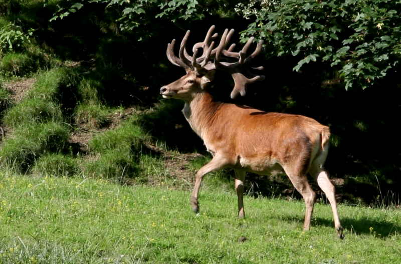 Red Deer (Cervus elaphus)